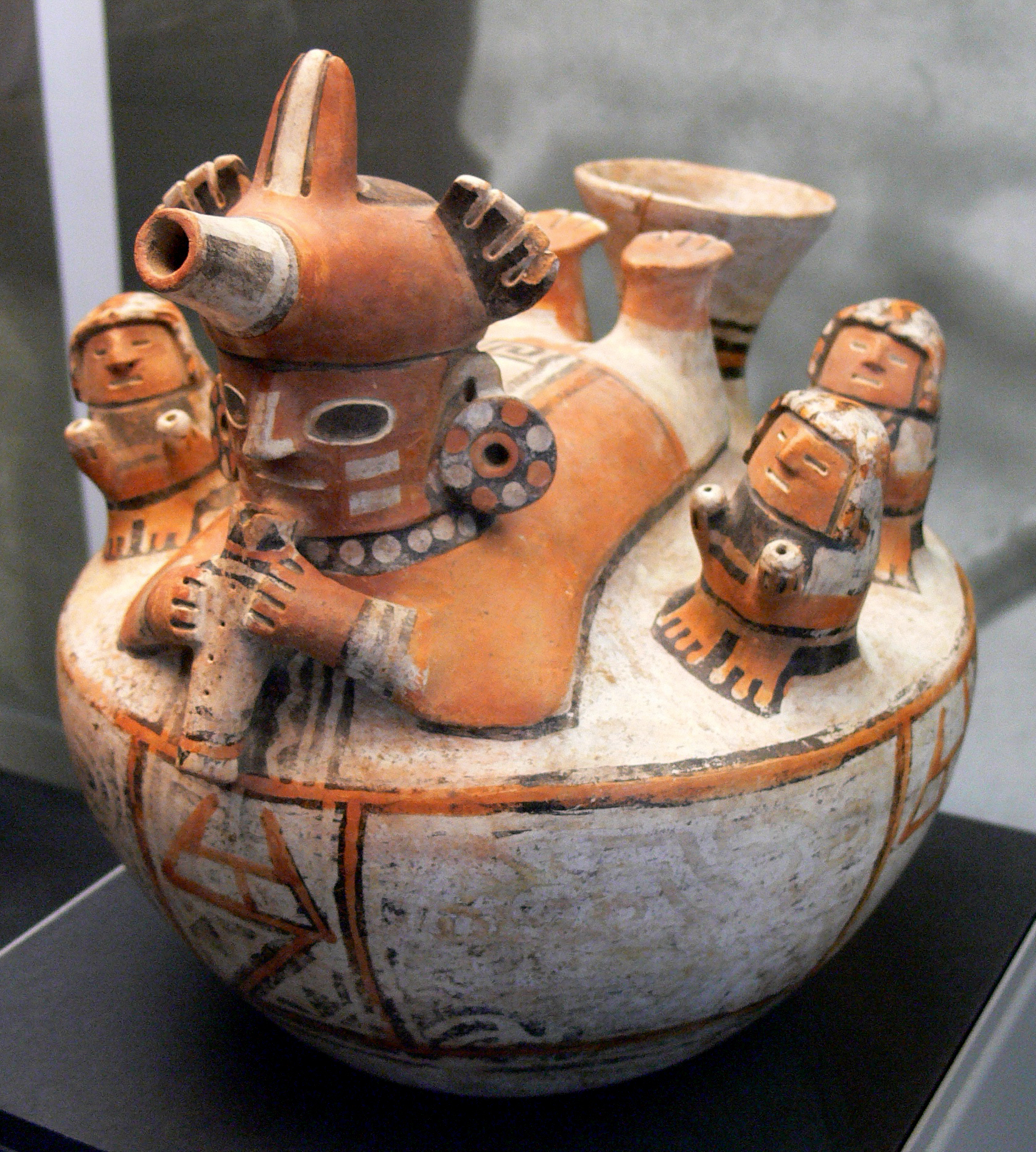 Schaffhausen, Museum zu Allerheiligen, Sammlung Ebnöther (Abteilung "Musik/Tanz") Gefäss mit Musikszene, Ton, modelliert, geritzt und bemalt; Höhe 21,5 cm; Peru, nördliche Küstenregion, Recuay; 100 v. Chr.–300 n. Chr. (Katalog 1999, S. 235)